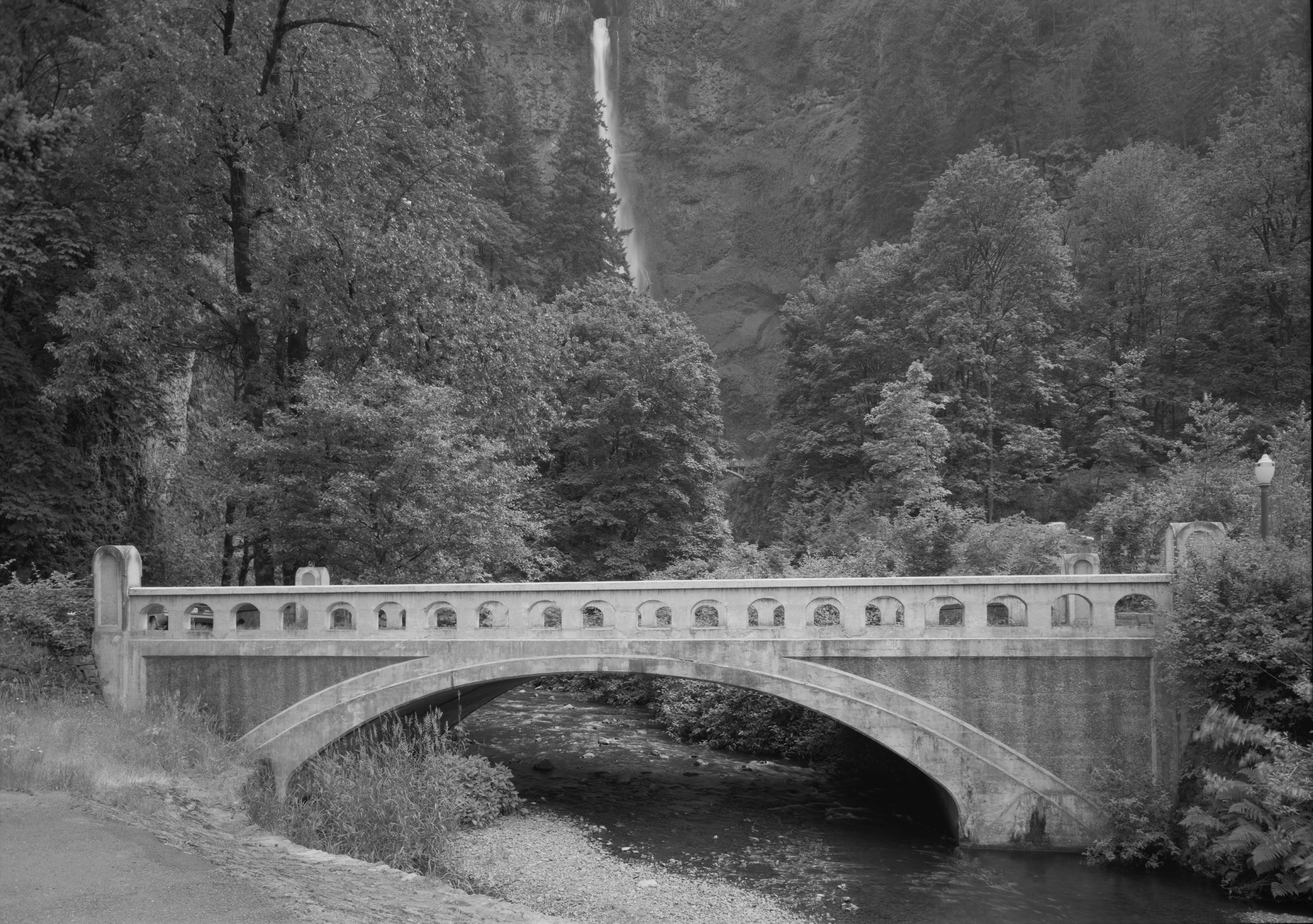 NORTH ELEVATION OF MULTNOMAH CREEK BRIDGE, VIEW LOOKING 130 DEGREES SOUTHEAST.